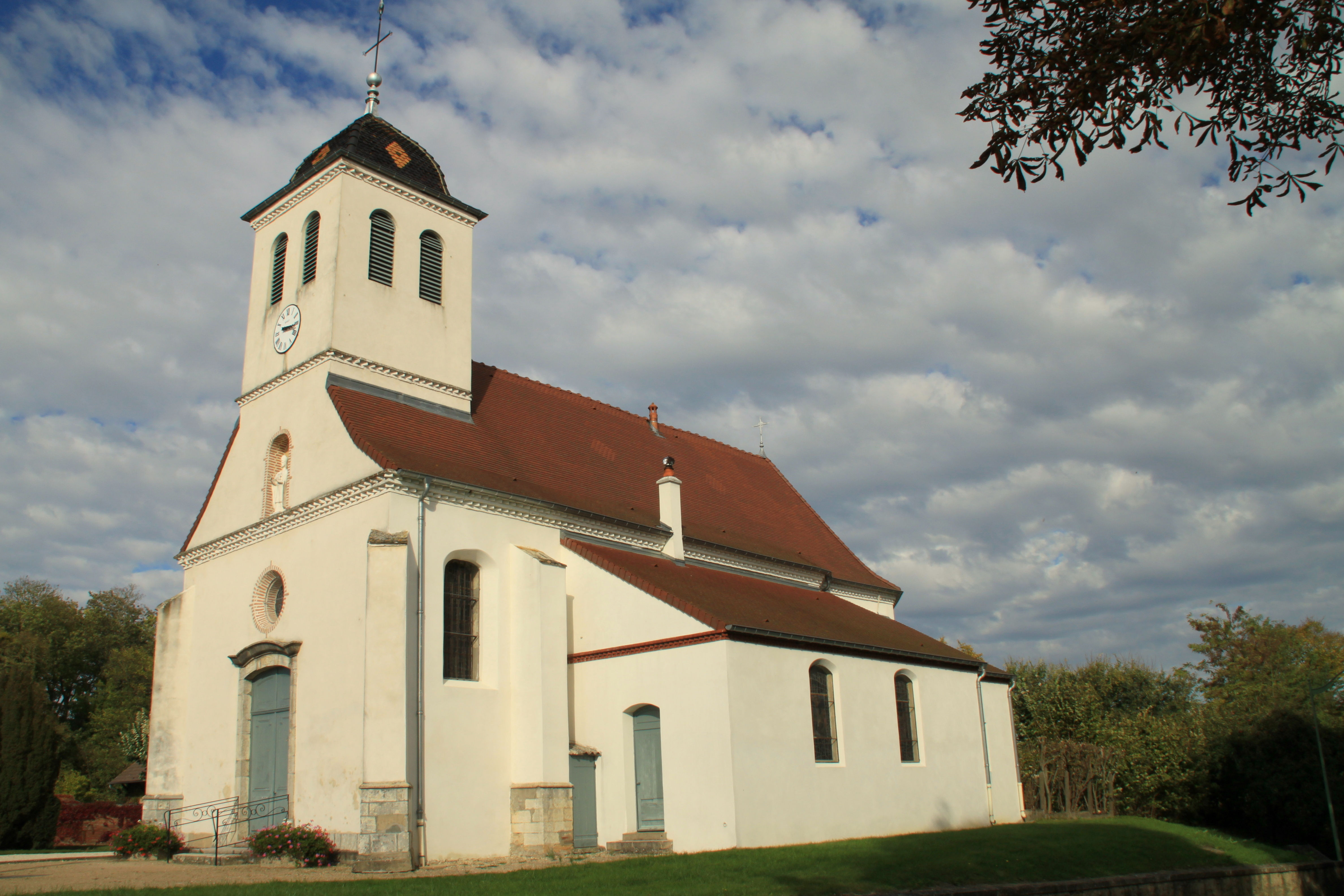 Charette-Varennes Kirche, im Annex die Heilige Jungfrau der Kranken und der Schiffer